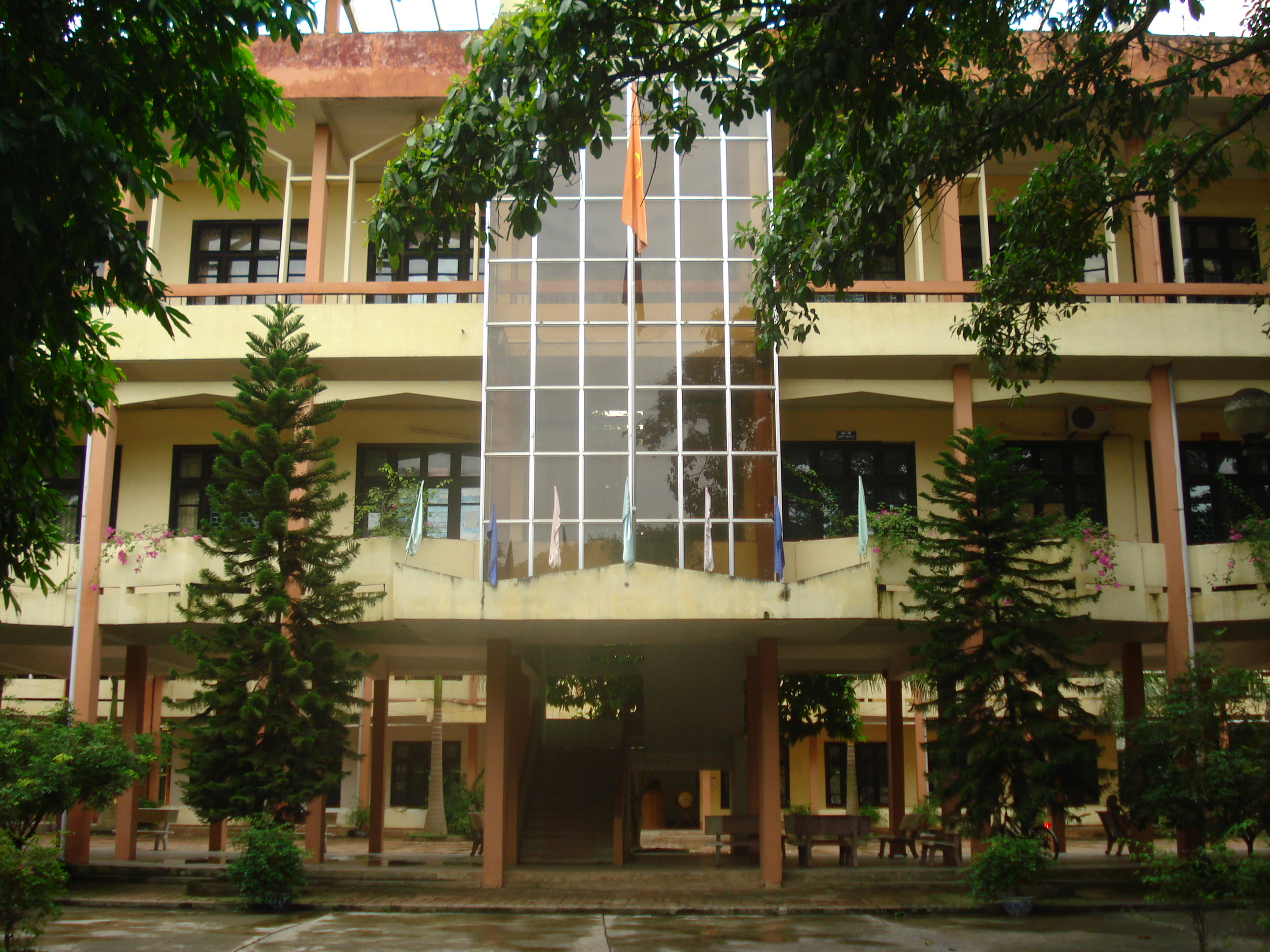 Nhà điều hành Chuyên Hùng Vương